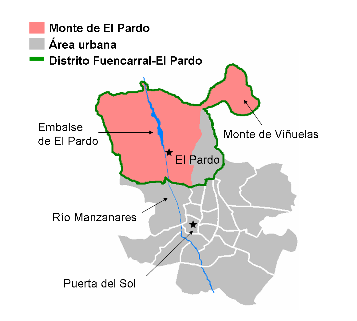 Map of Monte de El Pardo, in Madrid. Spain